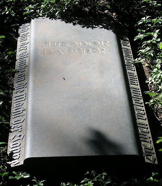 Grabstein von Theodor Däubler, Friedhof Heerstraße, Berlin Selbst aufgenommen, 29.08.2005